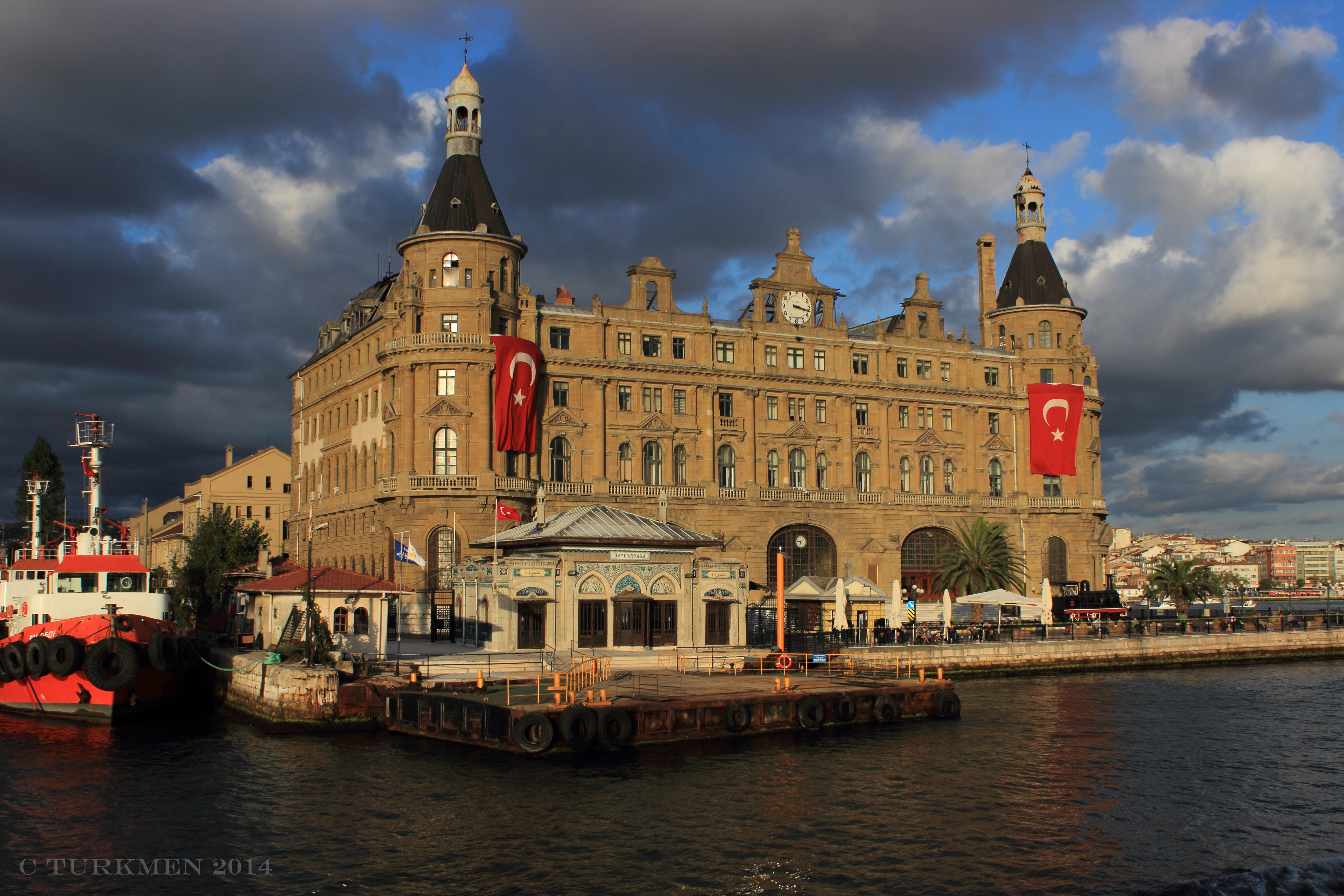 29 Ağustos 2014 tarihinde Beşiktaş-Kadıköy vapuru üzerinden çekilmiştir. Arka plandaki yağmur bulutlarının ve gar üzerine vuran akşam güneşinin etkisi ile oluşan yüksek karşıtlık sonucu, gar doğal olarak ön plana gelmiştir. Tarafımdan çekilmiş olup, herhangi bir kaynaktan alıntı değildir.